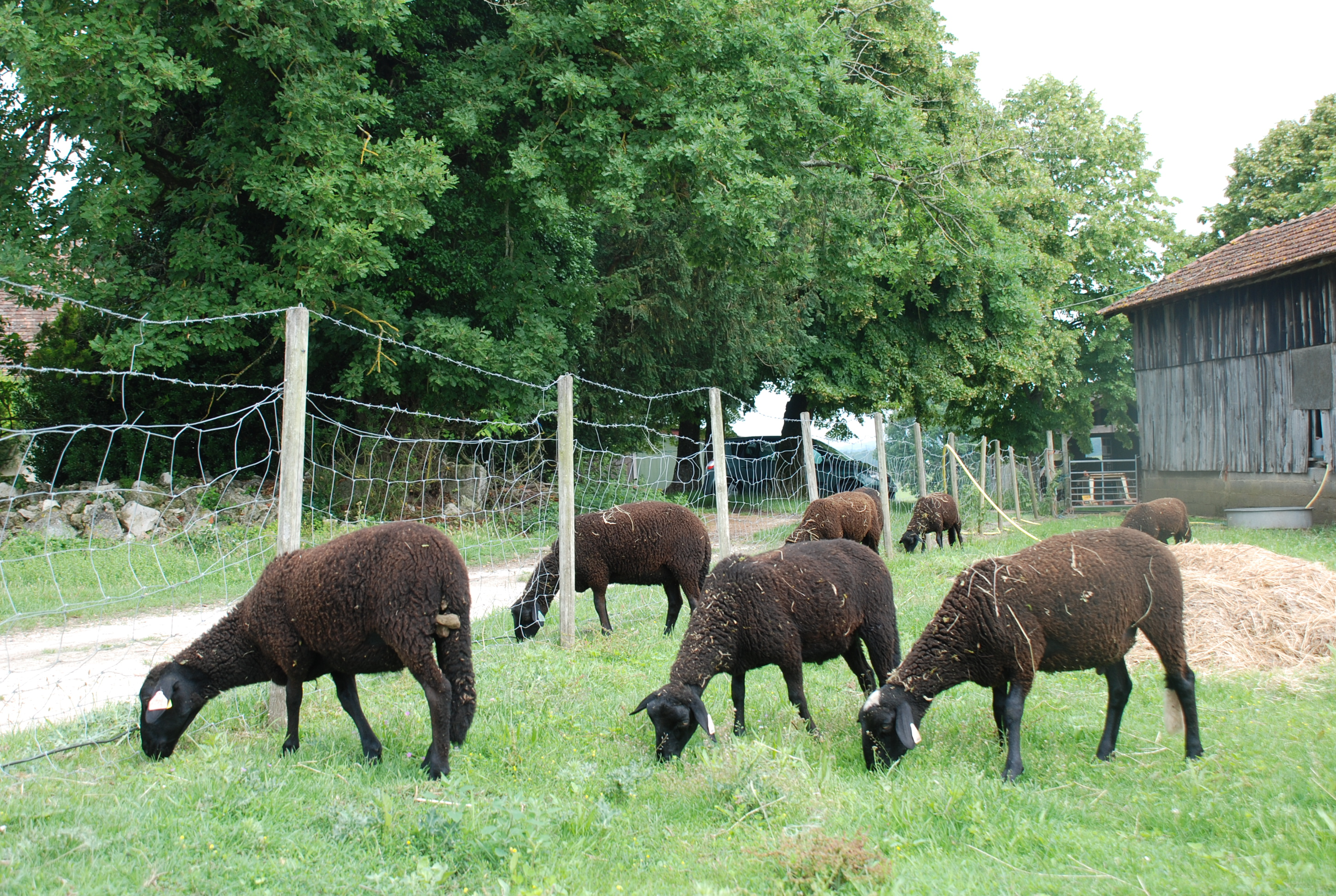 Noires du Velay photographiées en Dordogne (Bergeracois)